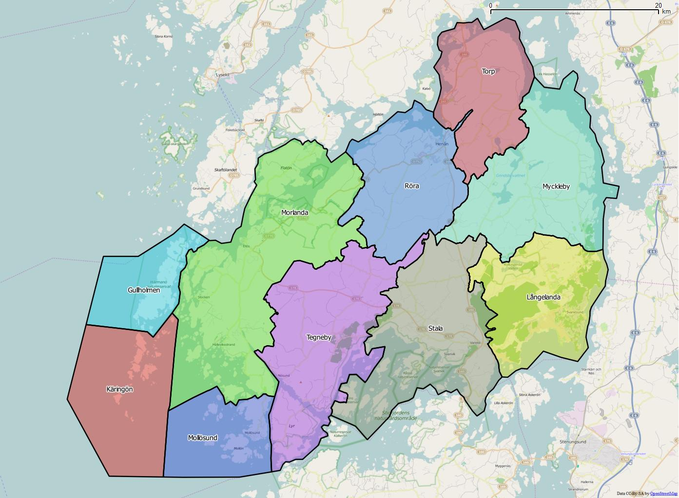 Distriktsindelningen i Orusts kommun World file: 58.13272430412362013 0 0 -58.13272430412362013 1247305.34969097375869751 8034576.32400038838386536